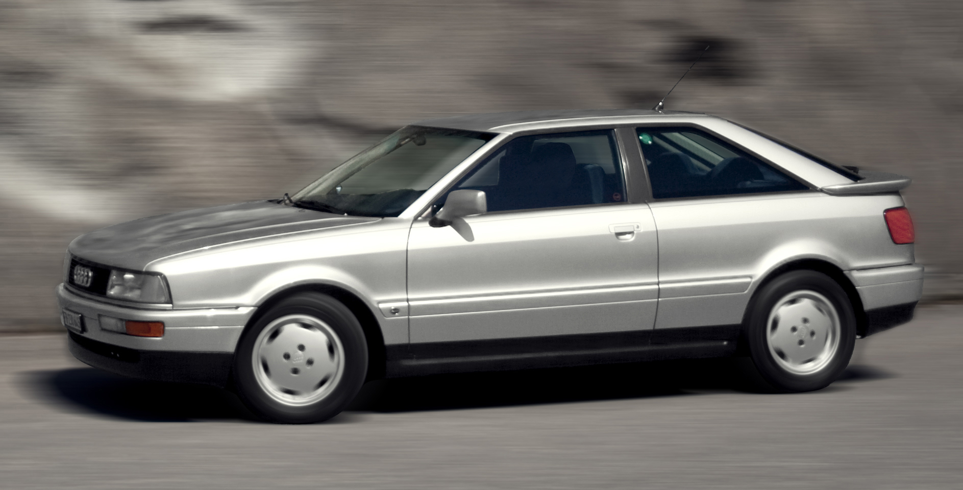 Audi Coupé 2.3E typ 89 136cv (100kw) extérieur argent Zermatt, intérieur Nautic état original, Suisse